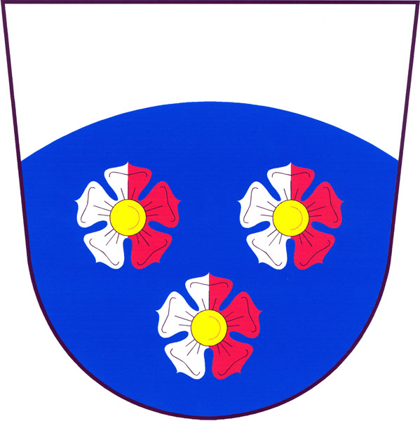 Znak obce Chrastavice